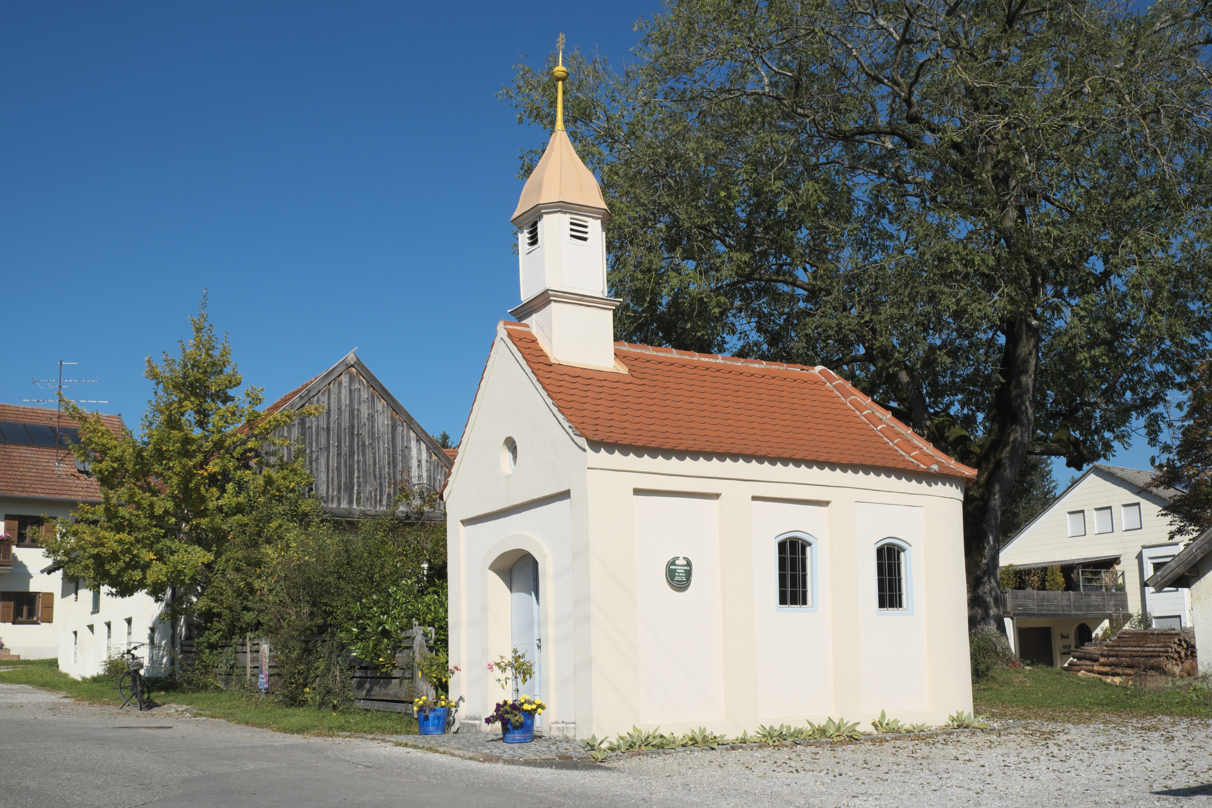 Katholische Kapelle St. Maria in Nebel (Germering) im Landkreis Fürstenfeldbruck (Bayern/Deutschland)